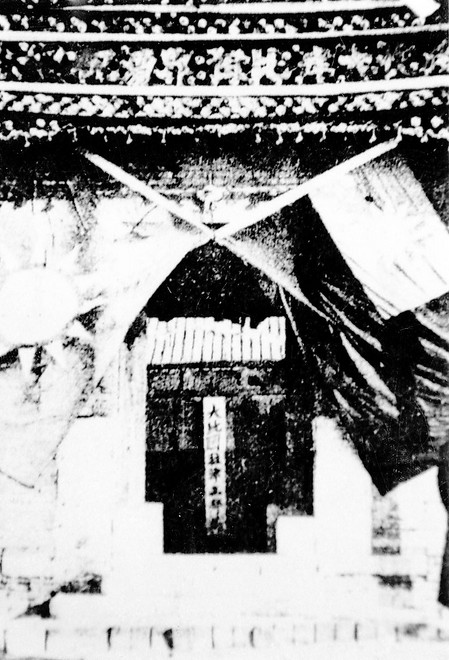 大比国驻津工部局旧影